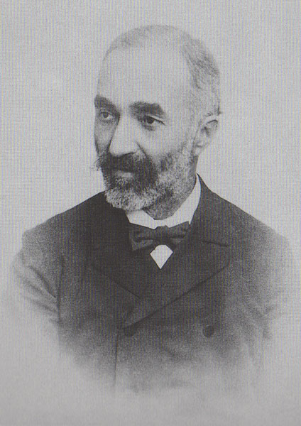 Драгутин Милутиновић, архитекта (1840-1900)